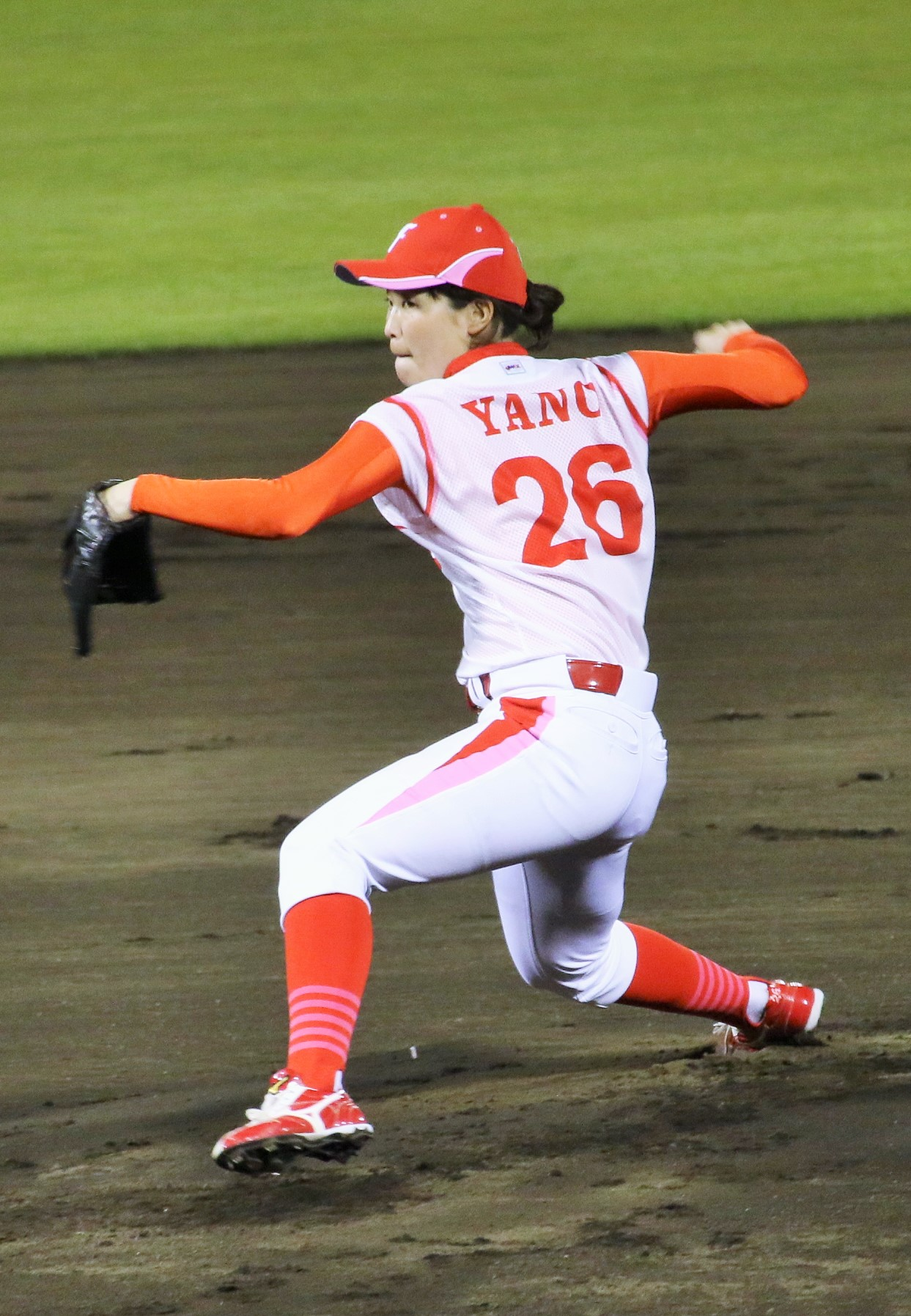 ウエストフローラ投手の矢野みなみ。わかさスタジアム京都にて。